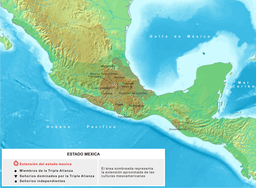 Extensión del estado mexica, mal llamado en algunas fuentes imperio azteca, que se desarrolló en Mesoamérica durante los siglos XIV-XVI NE